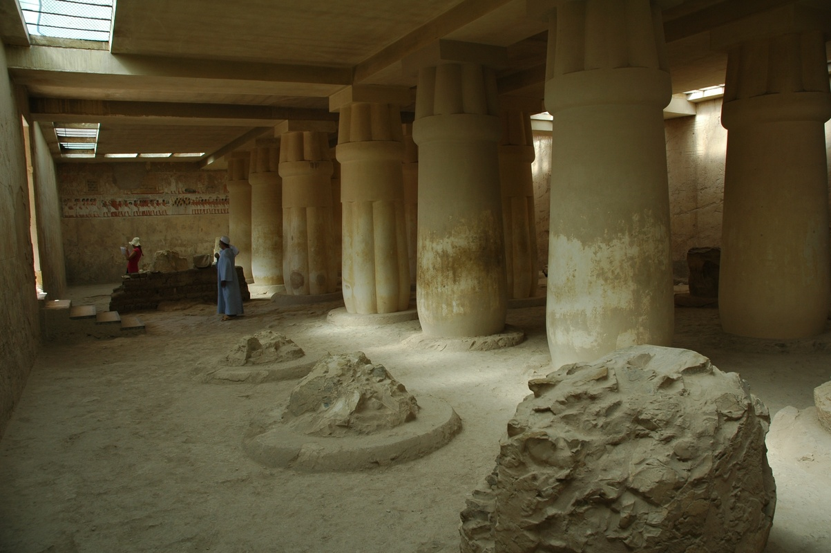 Grab des Ramose (TT55), Zeit des Amenophis III. und Echnaton, in Scheich Abd el-Gurna